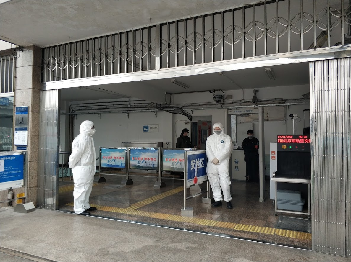 Control mèdic a l'estació de metro de Jishuitan (Pequín) a causa de l'amenaça de coronavirus 2019-nCoV. Els operaris, vestits de blanc, prenen la temperatura a tot aquell que vulgui accedir al metro.